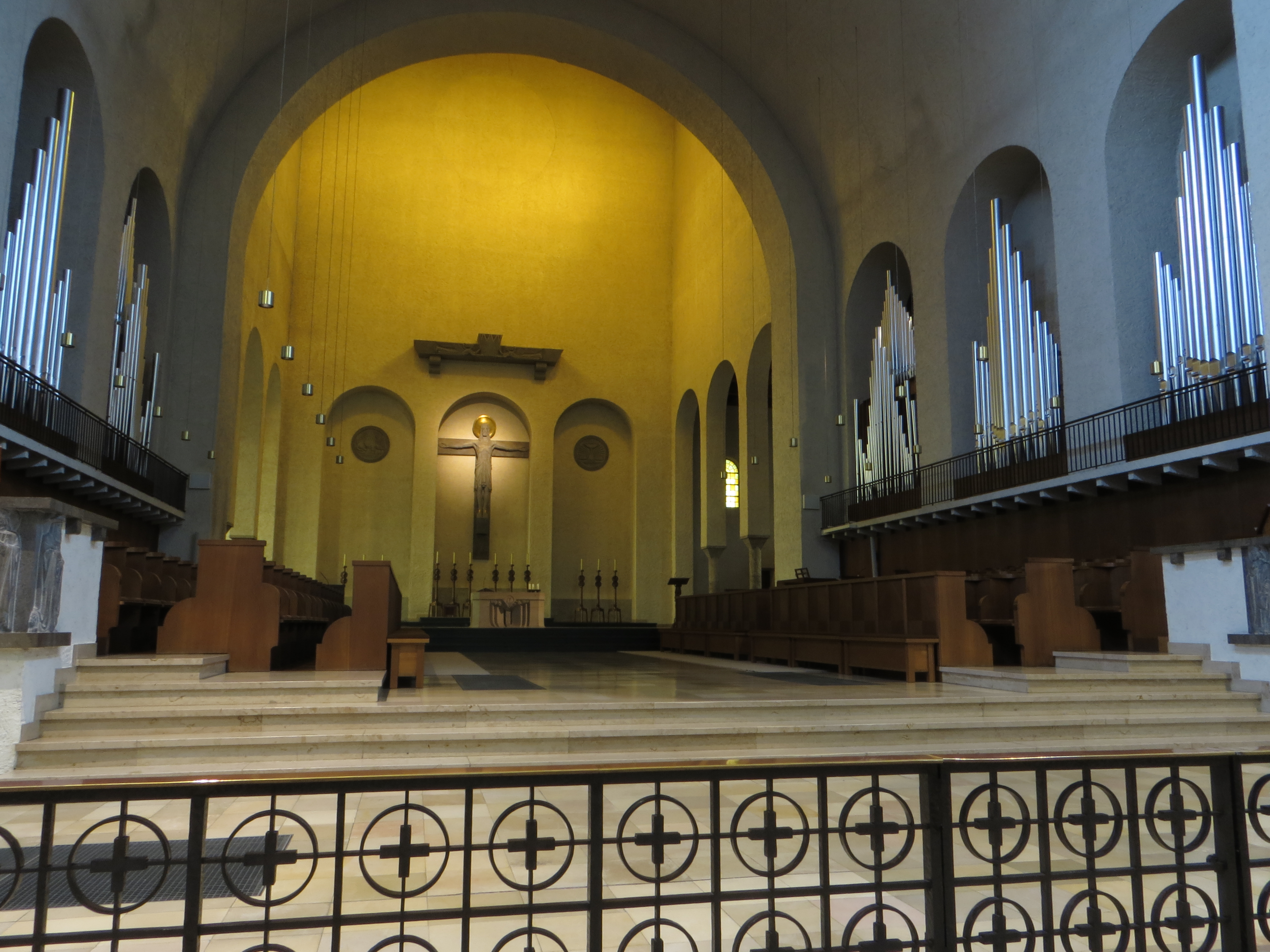 Blick auf Altarraum und Orgel der Abteikirche Münsterschwarzach